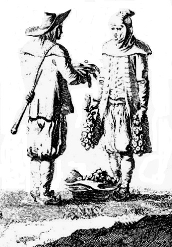 Marchand d'oignons et de panais près du Cap, près de Pont-Croix (Jacques Cambry, "Voyage dans le Finistère, ou Etat de ce département en 1794 et 1795")